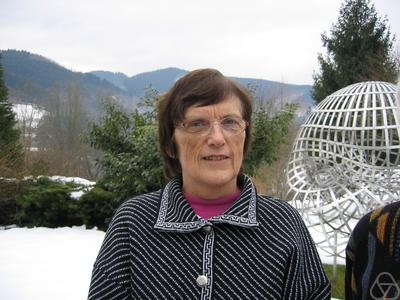 Foto di Idun Reiten